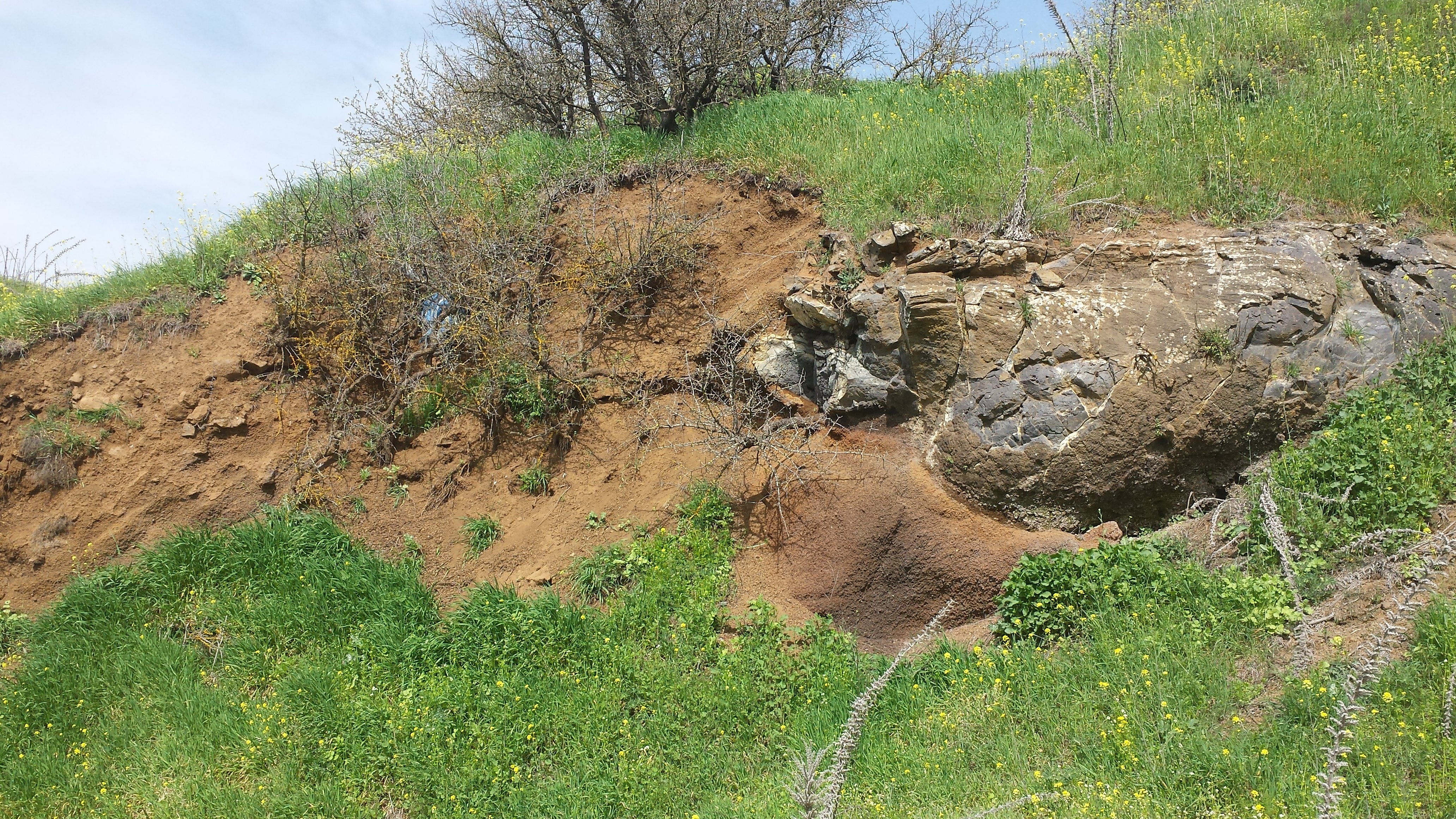 פצצה געשית גדולה (כ-6 טונות לערך) שנחשפה על הצד הצפוני של כביש הגישה בין תל בנטל לאביטל, רמת הגולן, ישראל